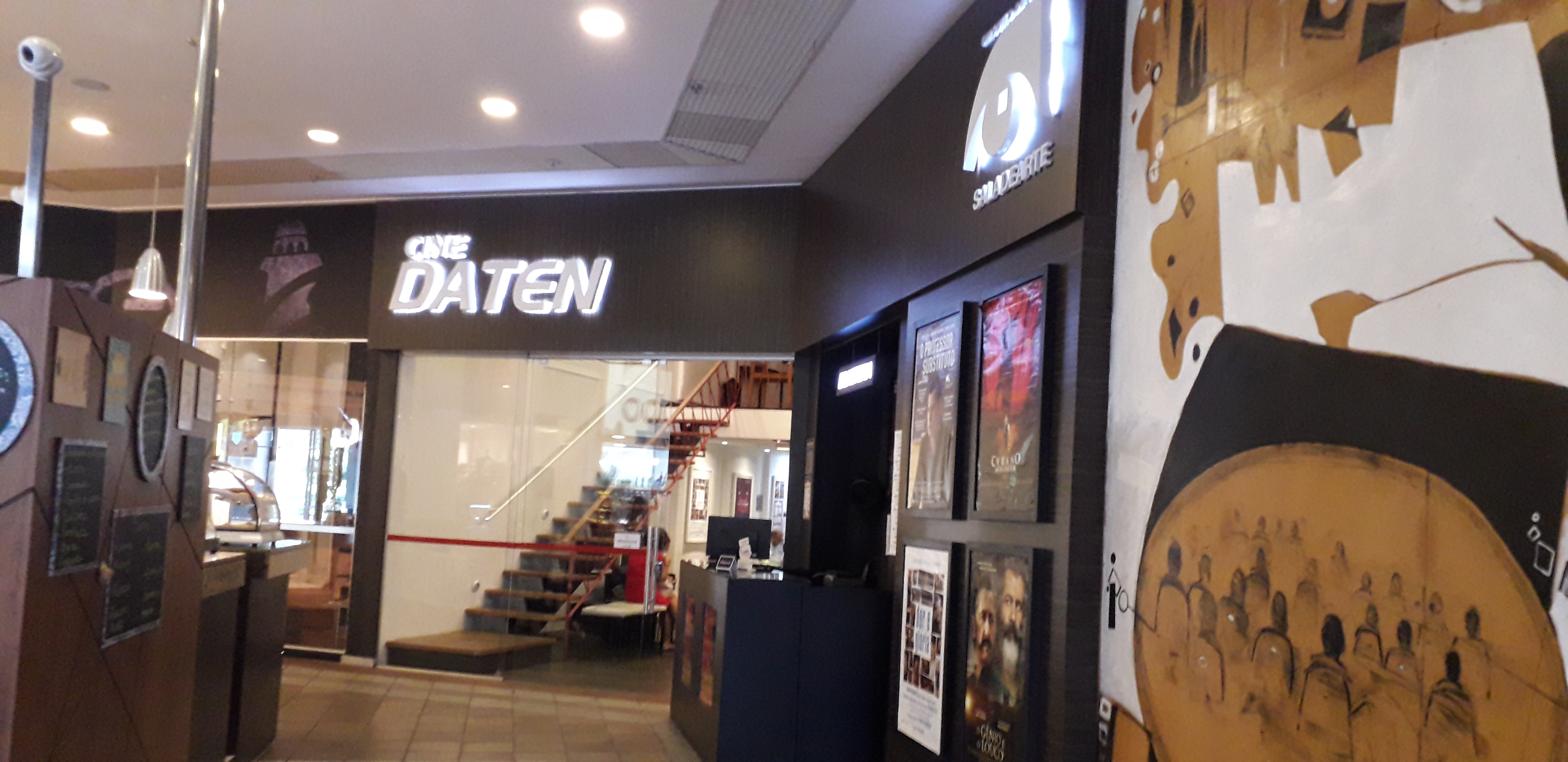 Imagens externas do complexo SaladeArte DATEN, instalado no Shopping Paseo Itaigara, em Salvador